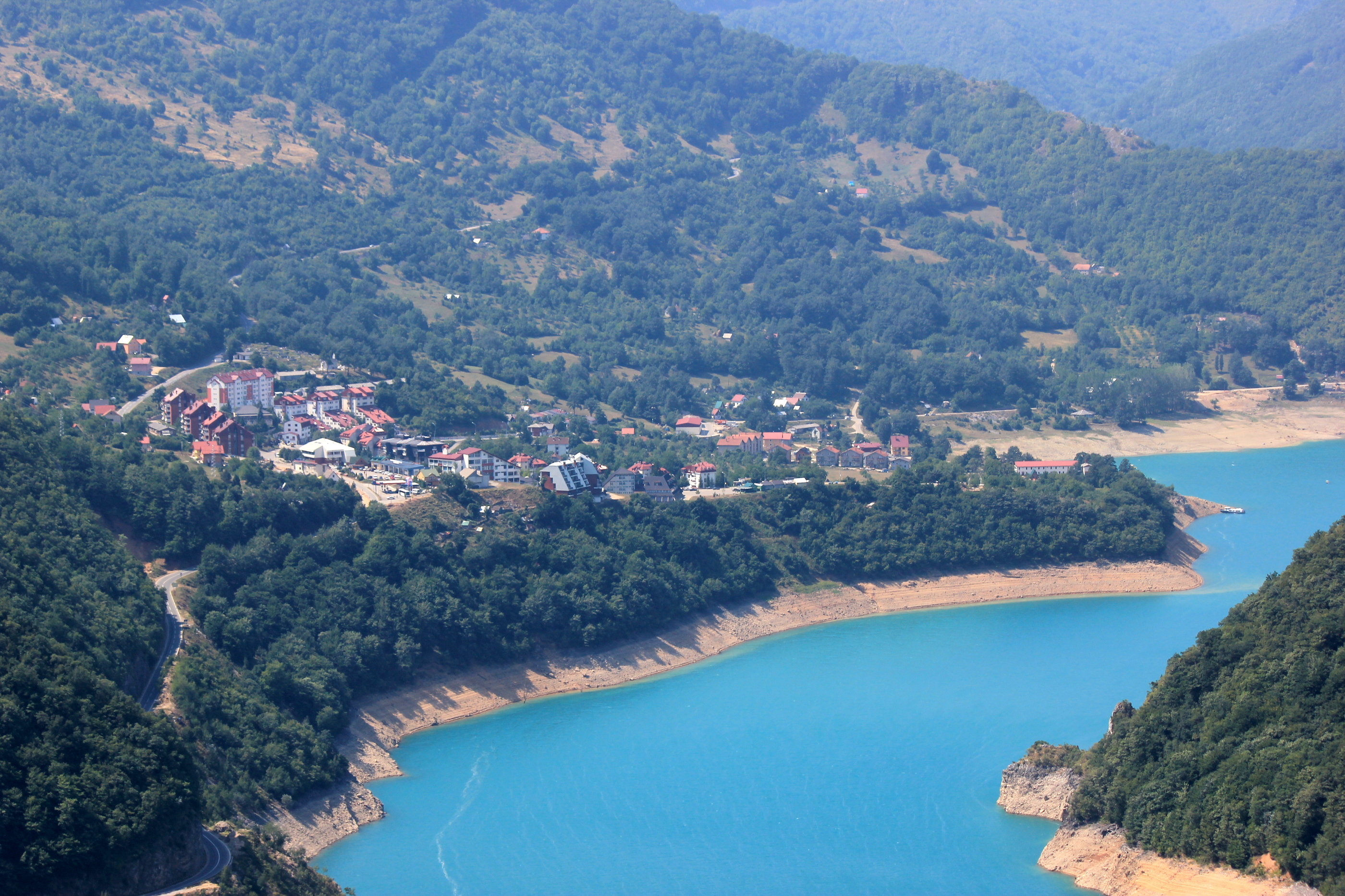 Blick auf den Piva-Stausee bei Plužine, Montenegro.Hornjoserbsce: Spjaty jězor Piwy pola Plužine na sewjerozapadźe Čorneje hory.